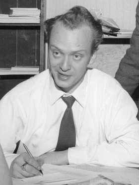 Distriktsordföranden Birger Hagård tar emot rapporter om nya unghögermedlemmar.473 nya betalande unghögermedlemmar blev resultatet av "Operation Måndag" bland 30 föreningar i Stockholms län. Kampanjen arrangerades på måndagskvällen i distriktets regi. Efter kl. 21 ringde föreningarna in sitt resultat och det bästa resultatet presenterades av konservativa skolungdomsföreningen på Lidingö, som hade skaffat hela 79 nya medlemmar. Näst bäst förening var Djursholm, som skaffade 55 nya medlemmar och därefter kom Stocksund med 52. Med detta har Stockholmsdistriktet av högerns ungdomsförbund passerat 2,000-strecket med god marginal.